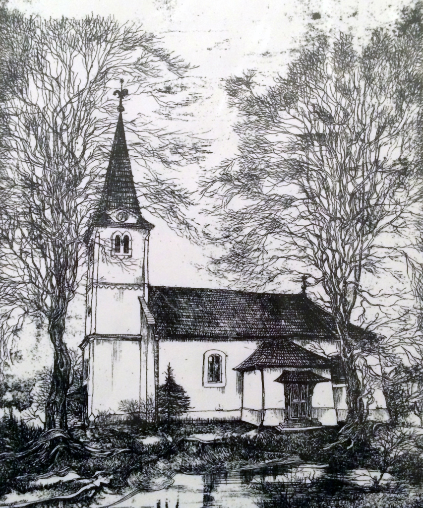 Az Aszaló Református templom a múltban, még a nagy tűzvész előtt.